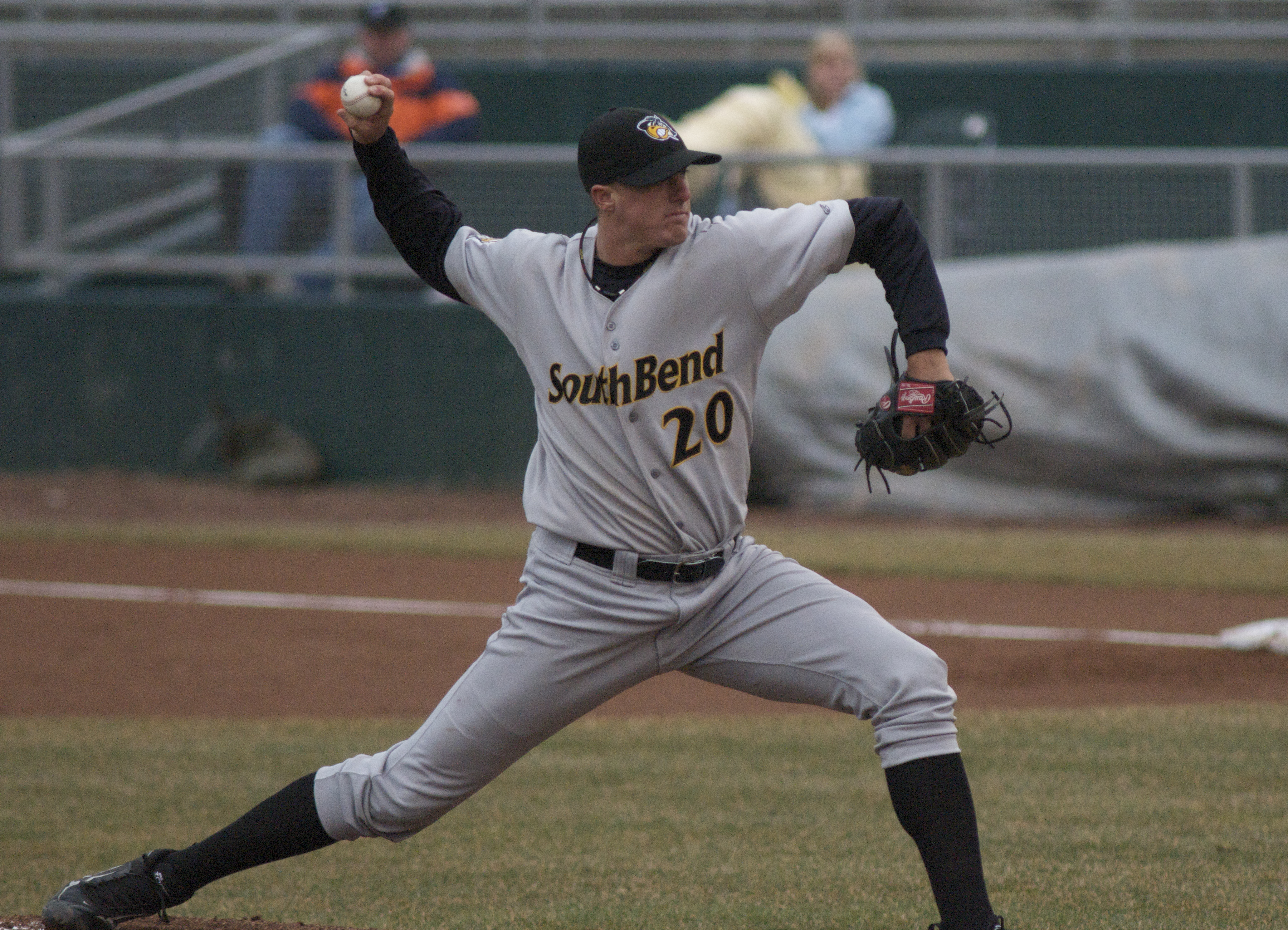 Bryan Augenstein